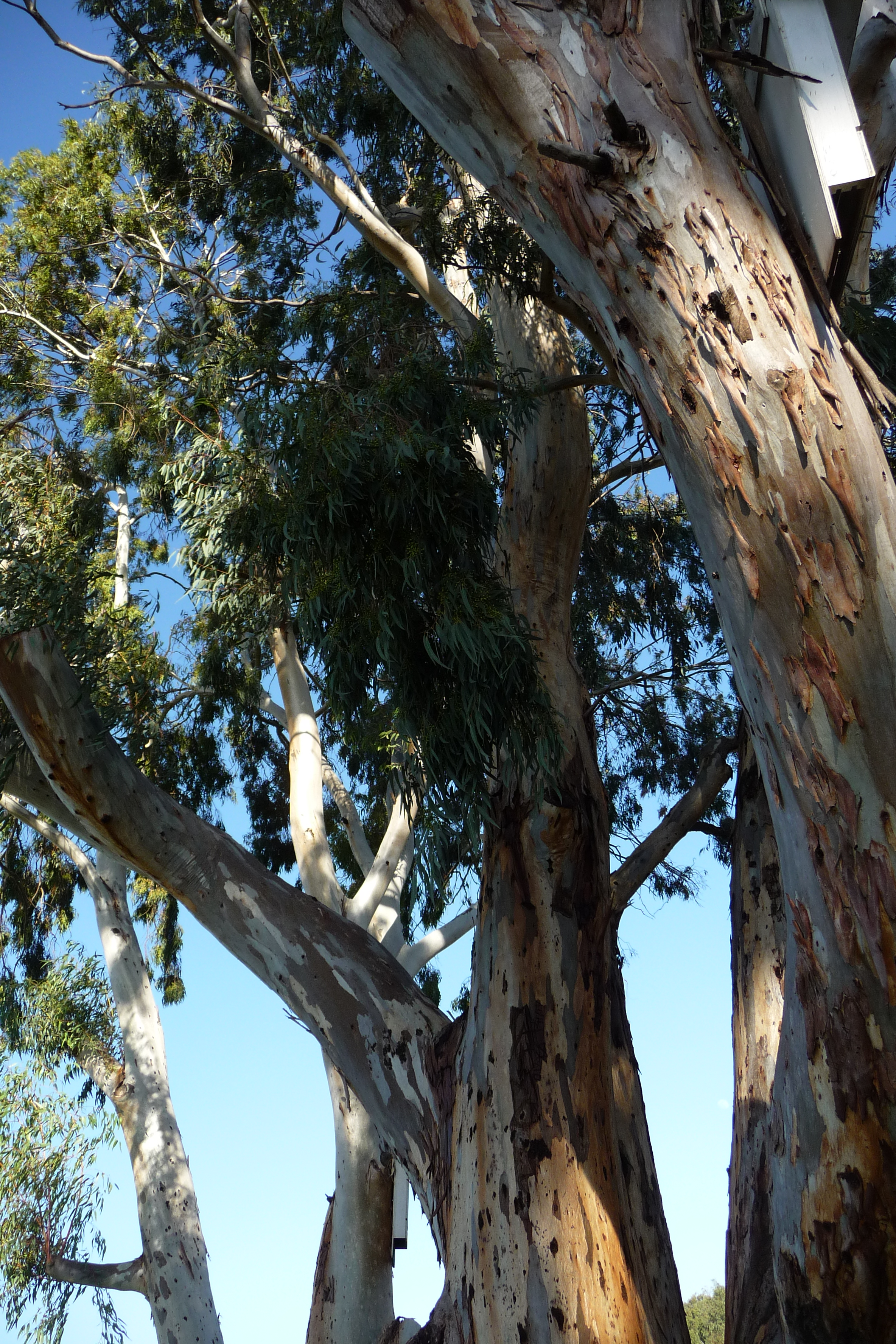 שמורת טבע בעמק זבולון, מזרחית לקריית ביאליק. השמורה כוללת הן את המעיינות והביצות המהווים את מקורו של נחל נעמן והן את האתר הארכאולוגי תל אפק. השמורה הוכרזה ב-1979 והיא משתרעת על פני 660 דונם. ב-1996 הוכרה השמורה כ"אתר רמסר" בהתאם לאמנת רמסר לשימור ולפיתוח בר-קיימא של בתי גידול לחים.